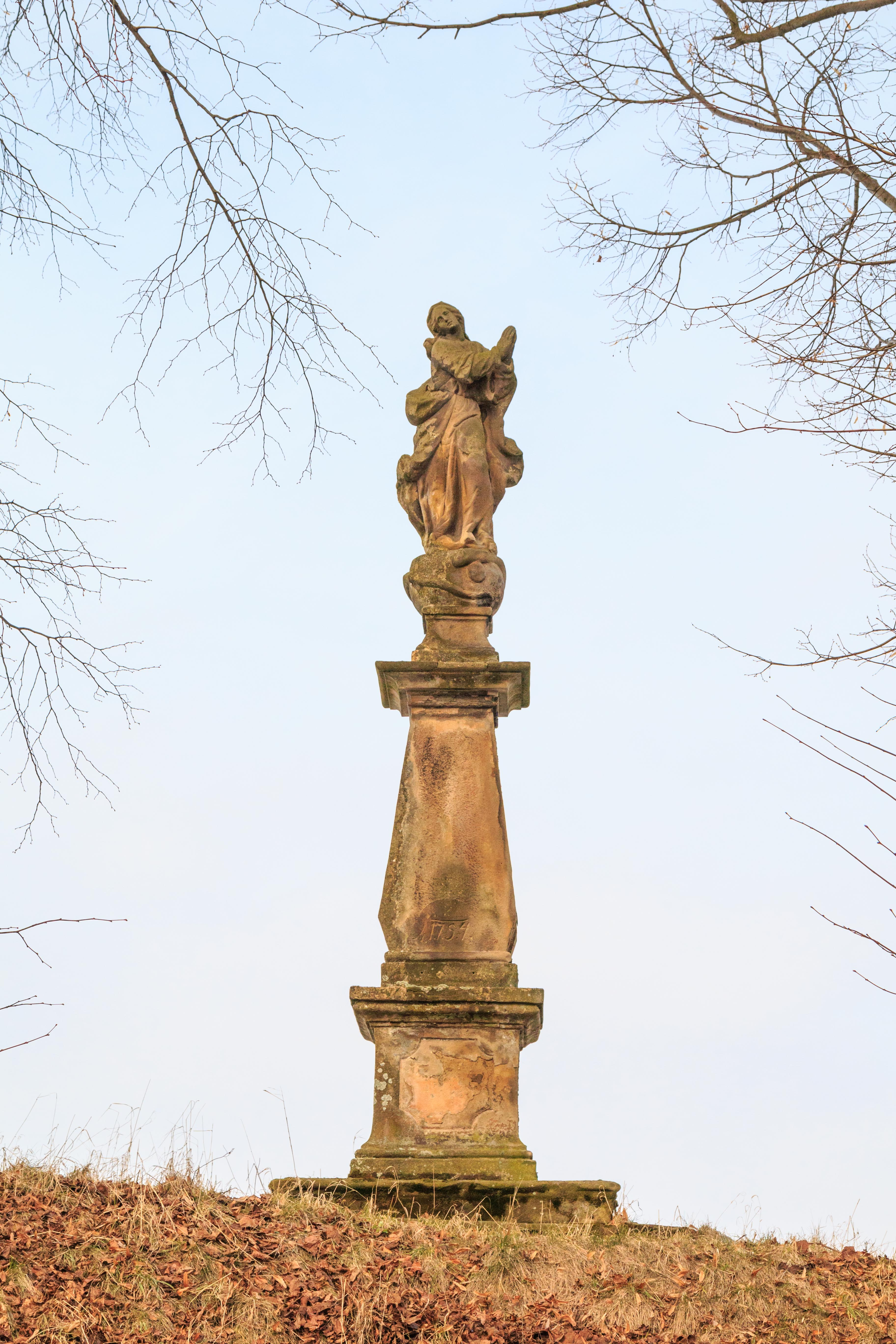 Sloup se sochou Panny Marie Immaculaty, jižní okraj obce, po pravé straně silnice na Bystřici, Střevač.